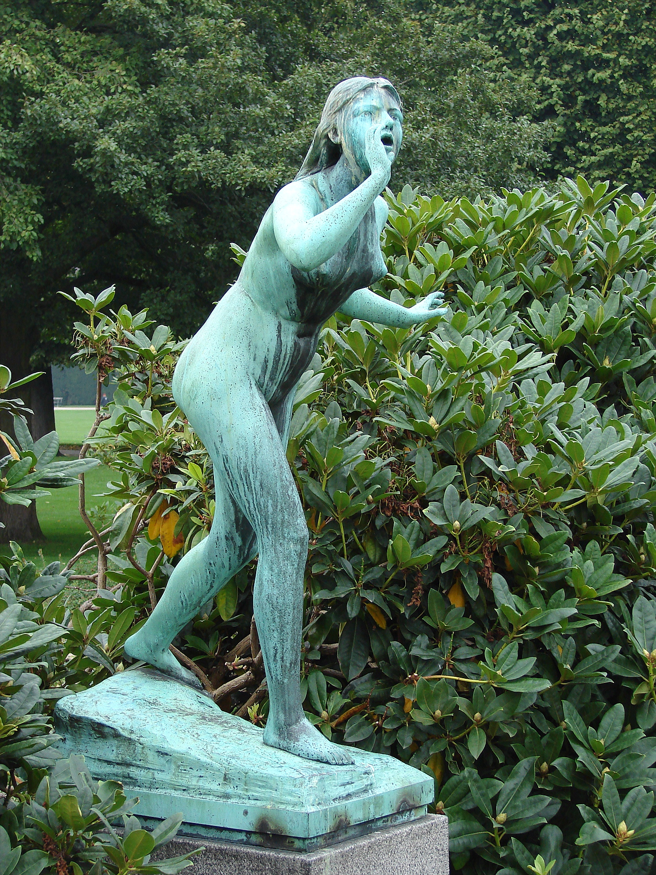 Ekko, Aksel Hansen, 1888, Kongens Have, København